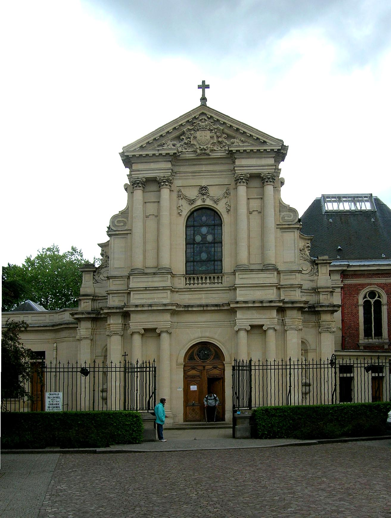 D'Kappell vum Carmel zu Lisieux (2006) Source: Eegen Opnam vum user ernmuhl